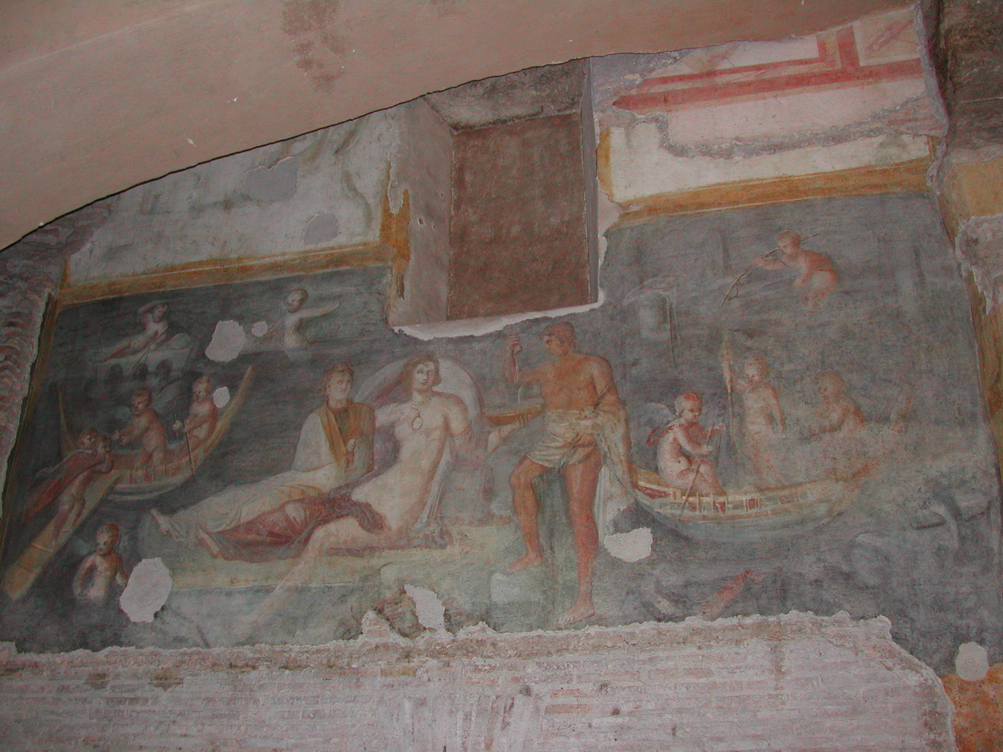 Roma, casa romana sotto la basilica dei santi Giovanni e Paolo - Ninfeo di Proserpina, affreschi.